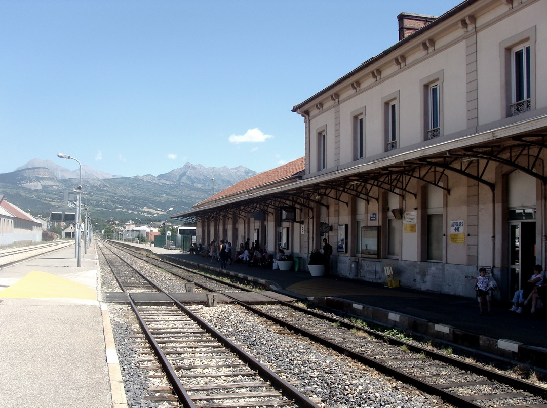 La gare de Gap côté voies, vue prise en direction de l'est